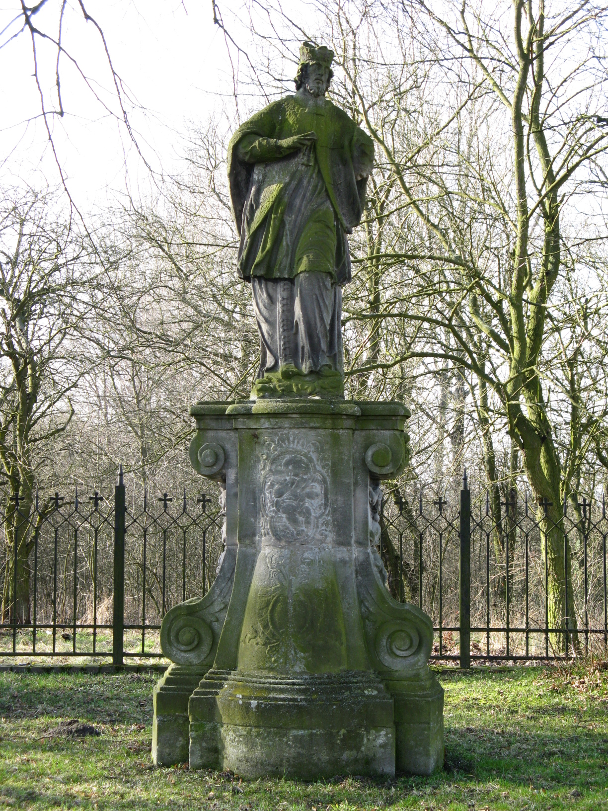 Figura na grobowcu rodzinym Kosińskich.